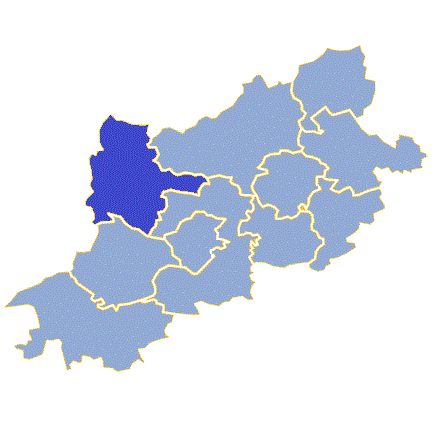 Powiat zielonogórski - Gmina Czerwieńsk